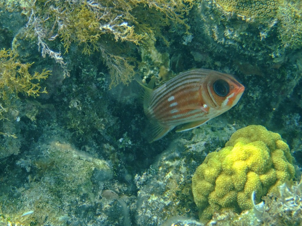 Squirrel Fish